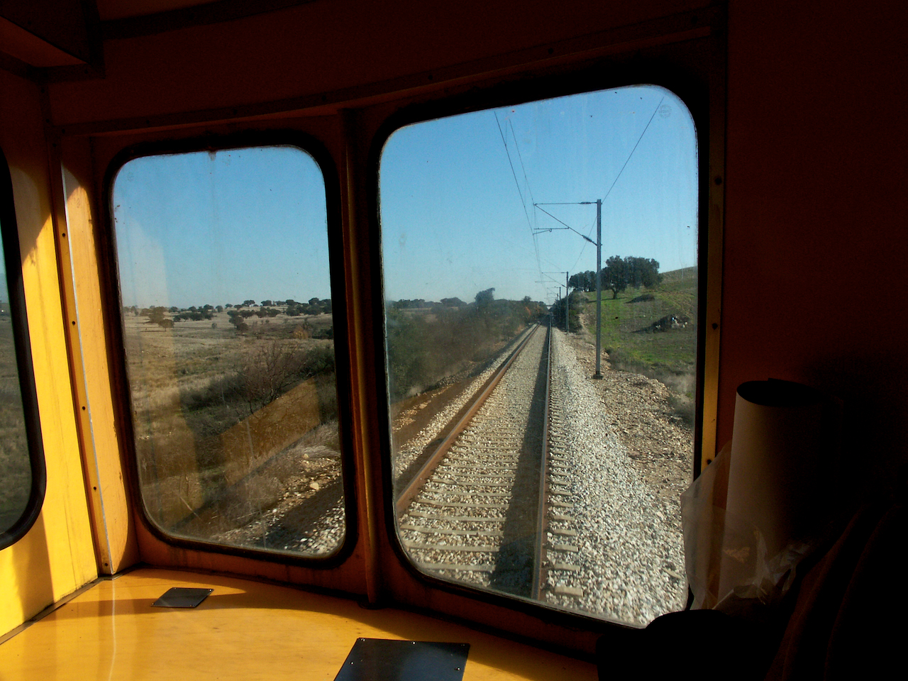 Tipo: Comboio Regional 4802 [Funcheira - Casa Branca] Local: antes da Estação de Ourique [Linha do Alentejo, PK 207] Data e hora: 4 de Dezembro de 2004 [10h58] Material: Automotora 0113 [Unidade Simples Diesel - Nohab] vídeo desta viagem aqui.